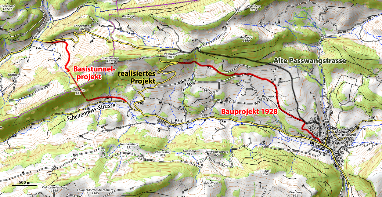 Karte der Passwang-Strassenprojekte von 1928